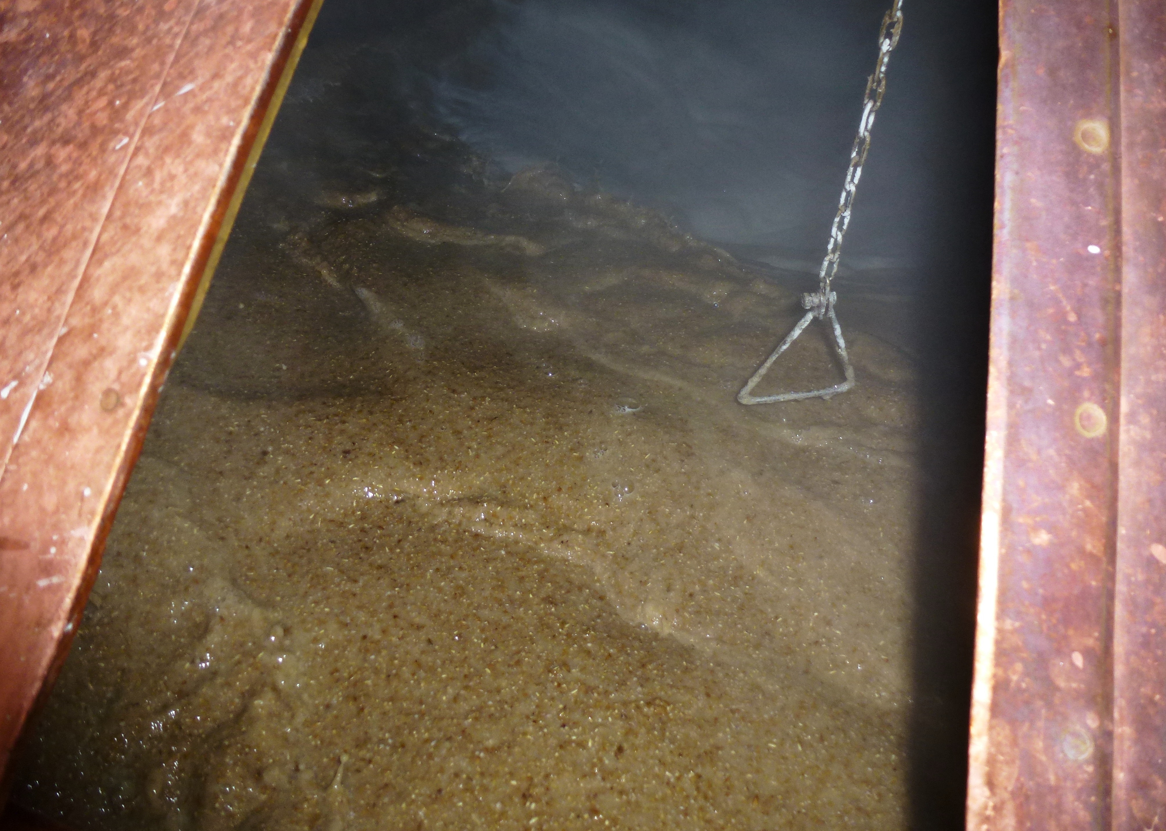 Brygghuset, Vårby bryggeri vörtpanna, maltkok